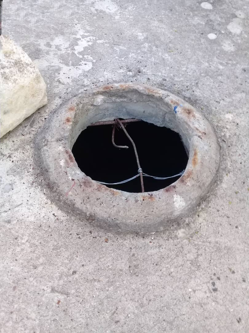 فتحة في سقف غرفة لوضع التبن أو الدريس